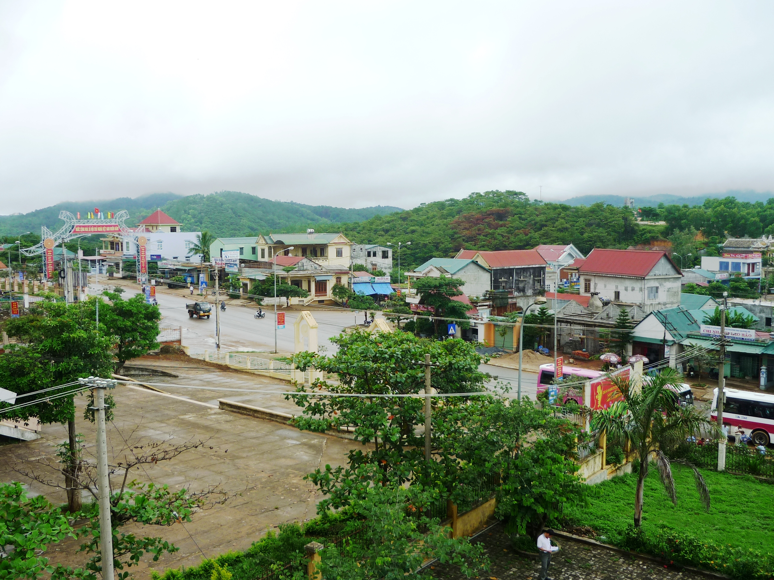 Khe Sanh